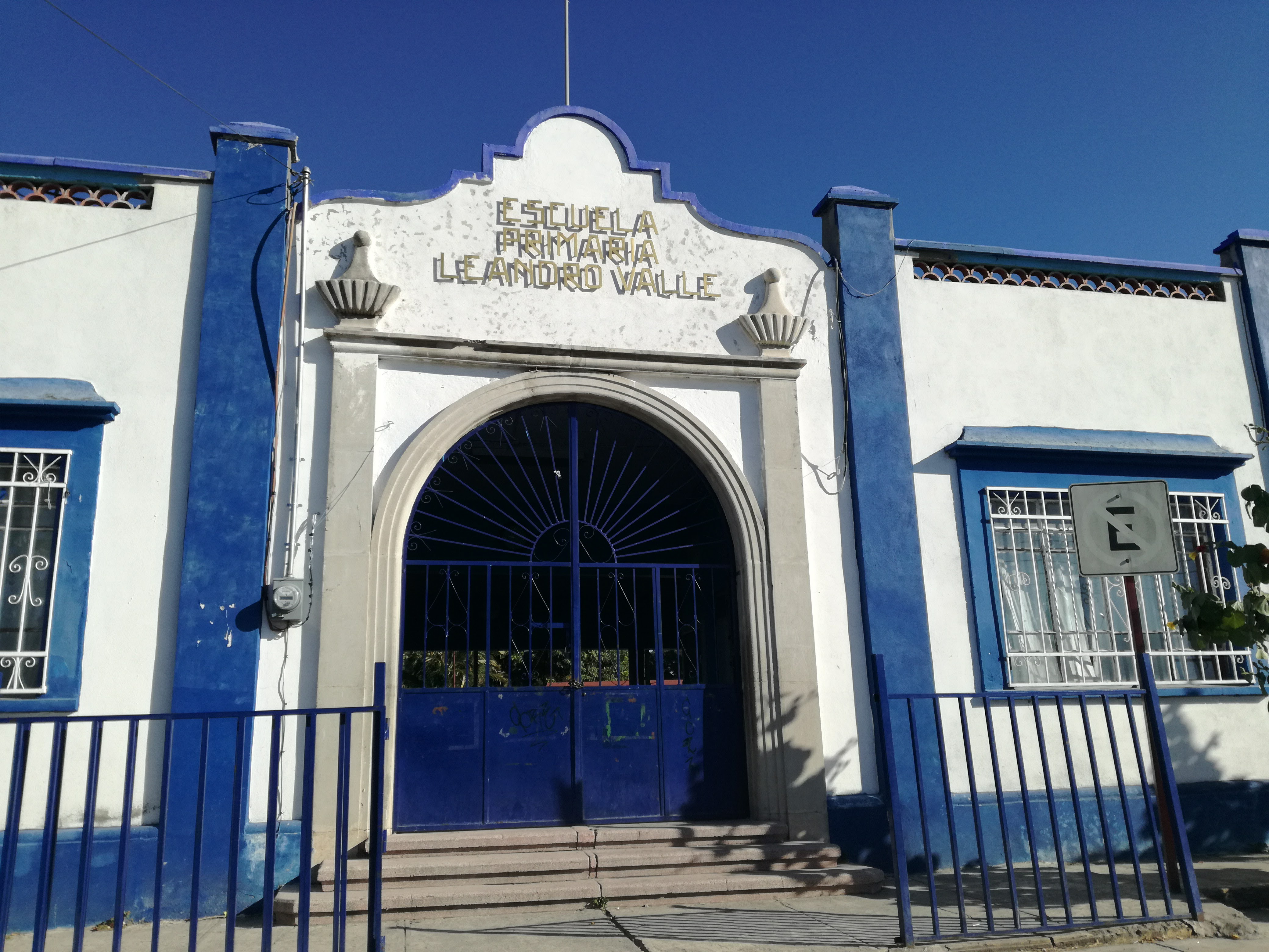 Escuela primaria Leandro Valle en Jonacatepec, Morelos, México.